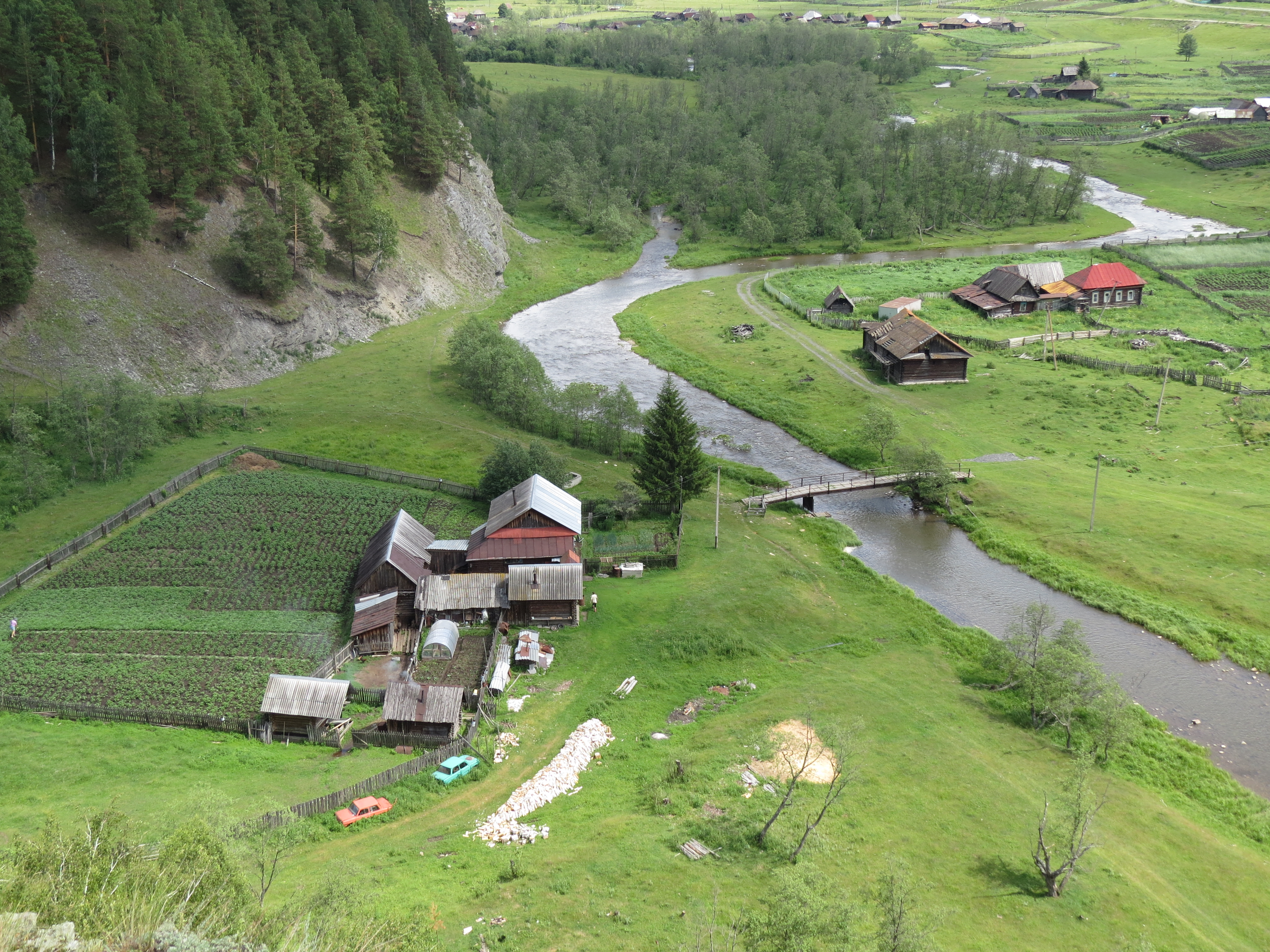 Ишля.